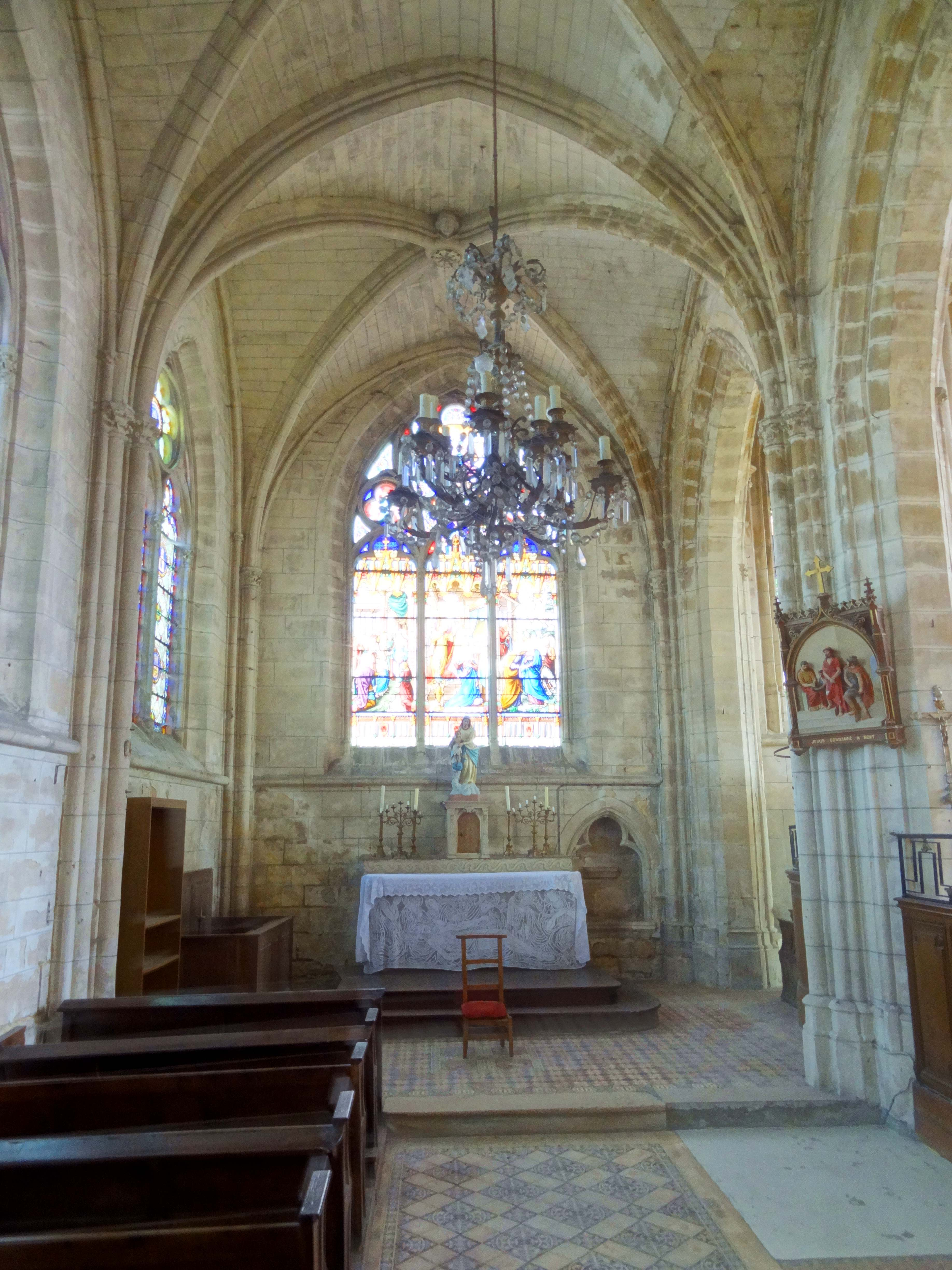 Intérieur de l'église - voir titre.